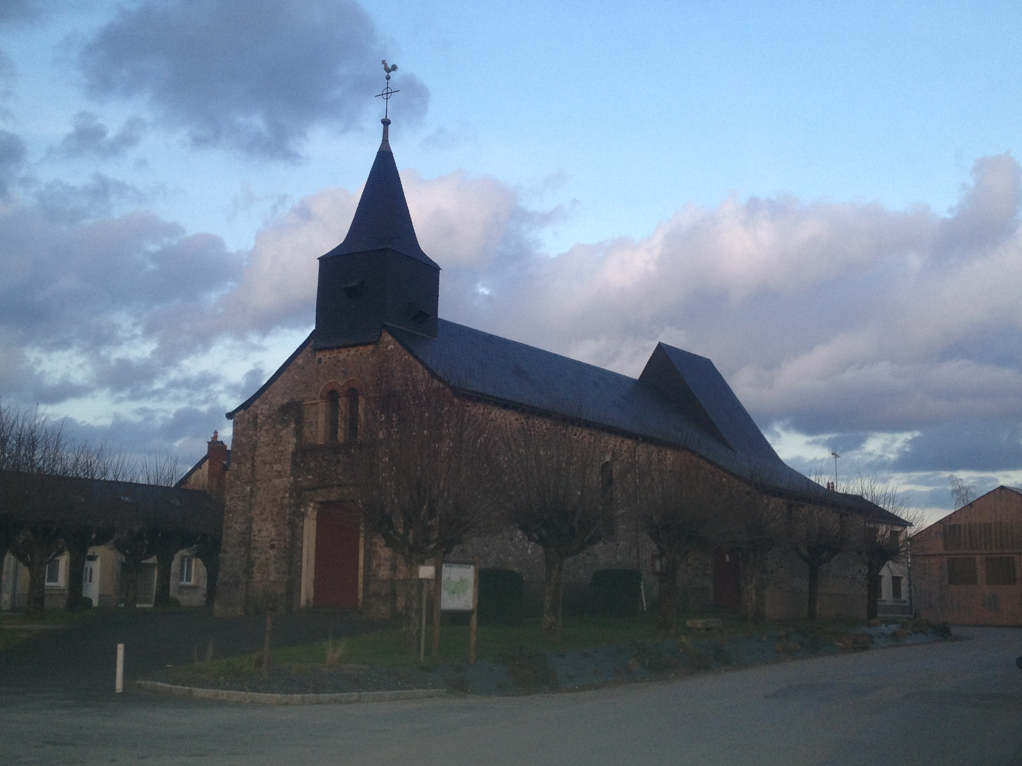 Mayenne, France